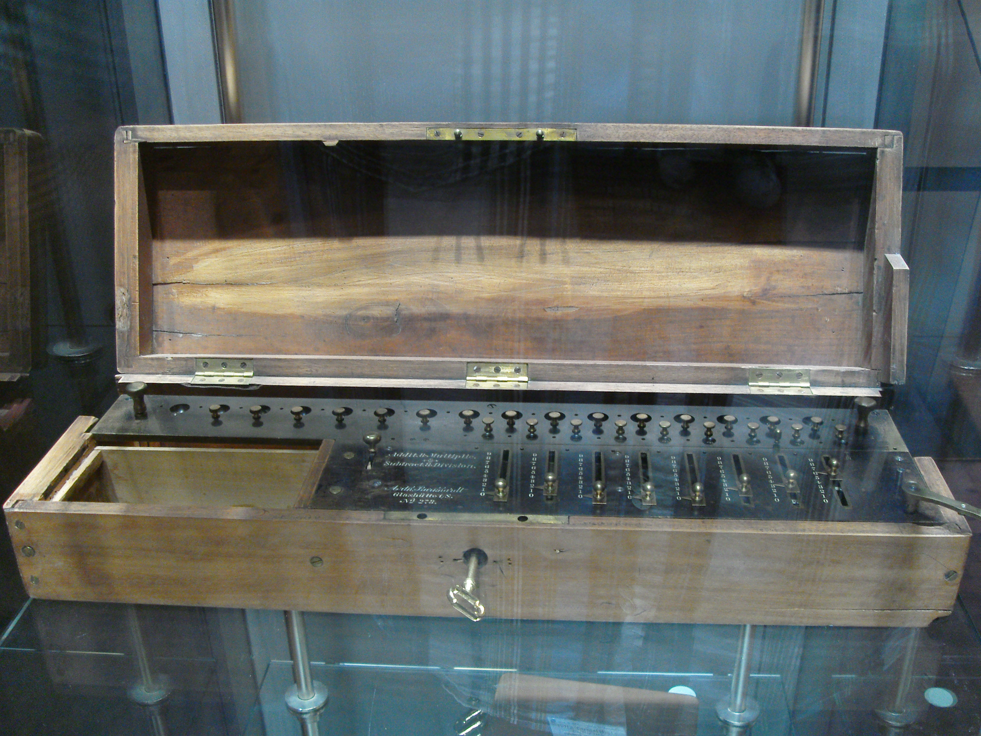 Rechenmaschine-Arthur Burkhardt - Ausstellungsstück der DASA in Dortmund